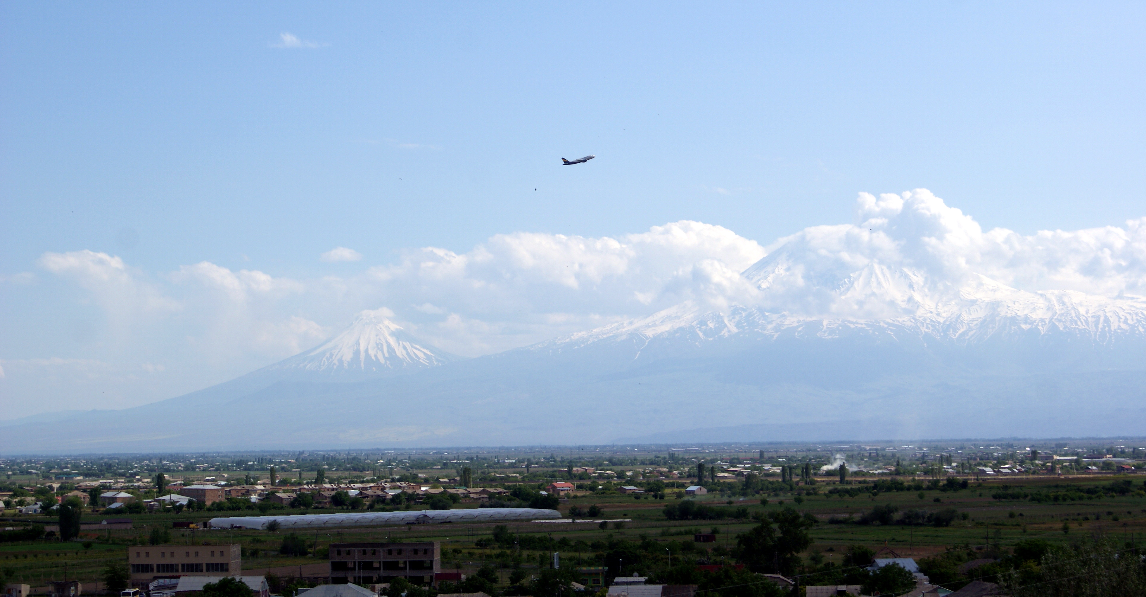 Ararat & Arbat village from Musa Ler